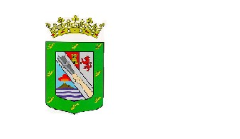 Bandera de Güímar